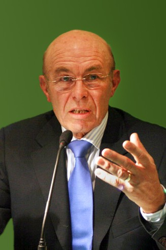 Wilhelm Schlötterer, ehemaliger deutscher Verwaltungsjurist und Buchautor